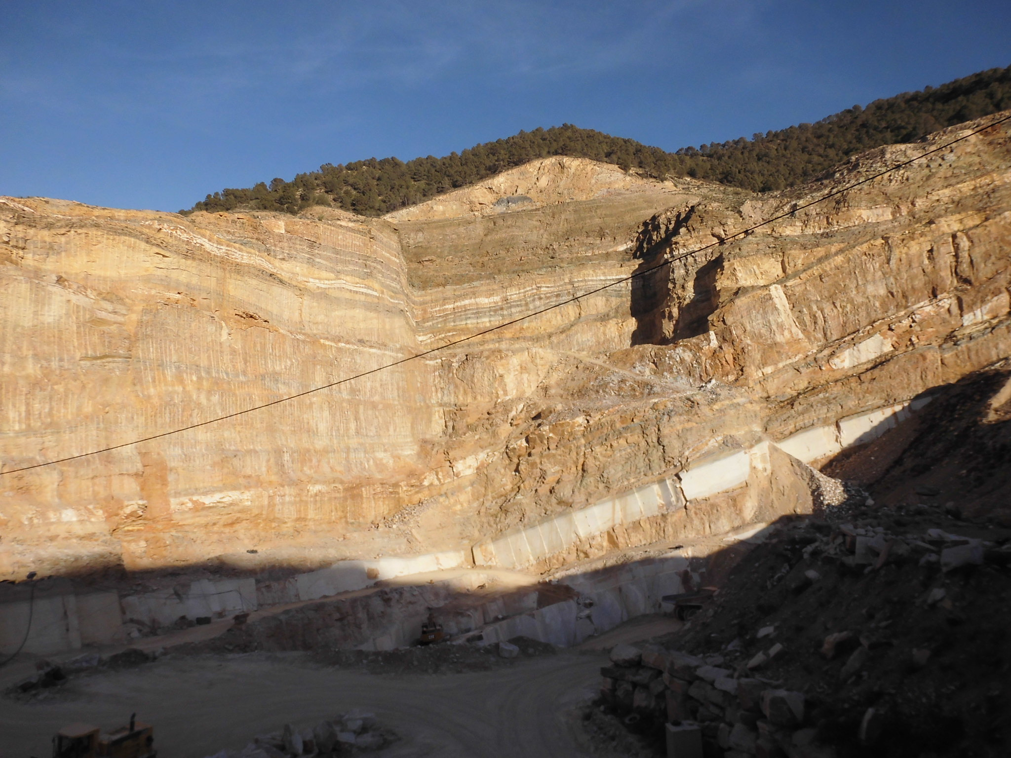 Fotografía de una cantera de mármol del municipio de Macael, provincia de Almería, Andalucía, España.